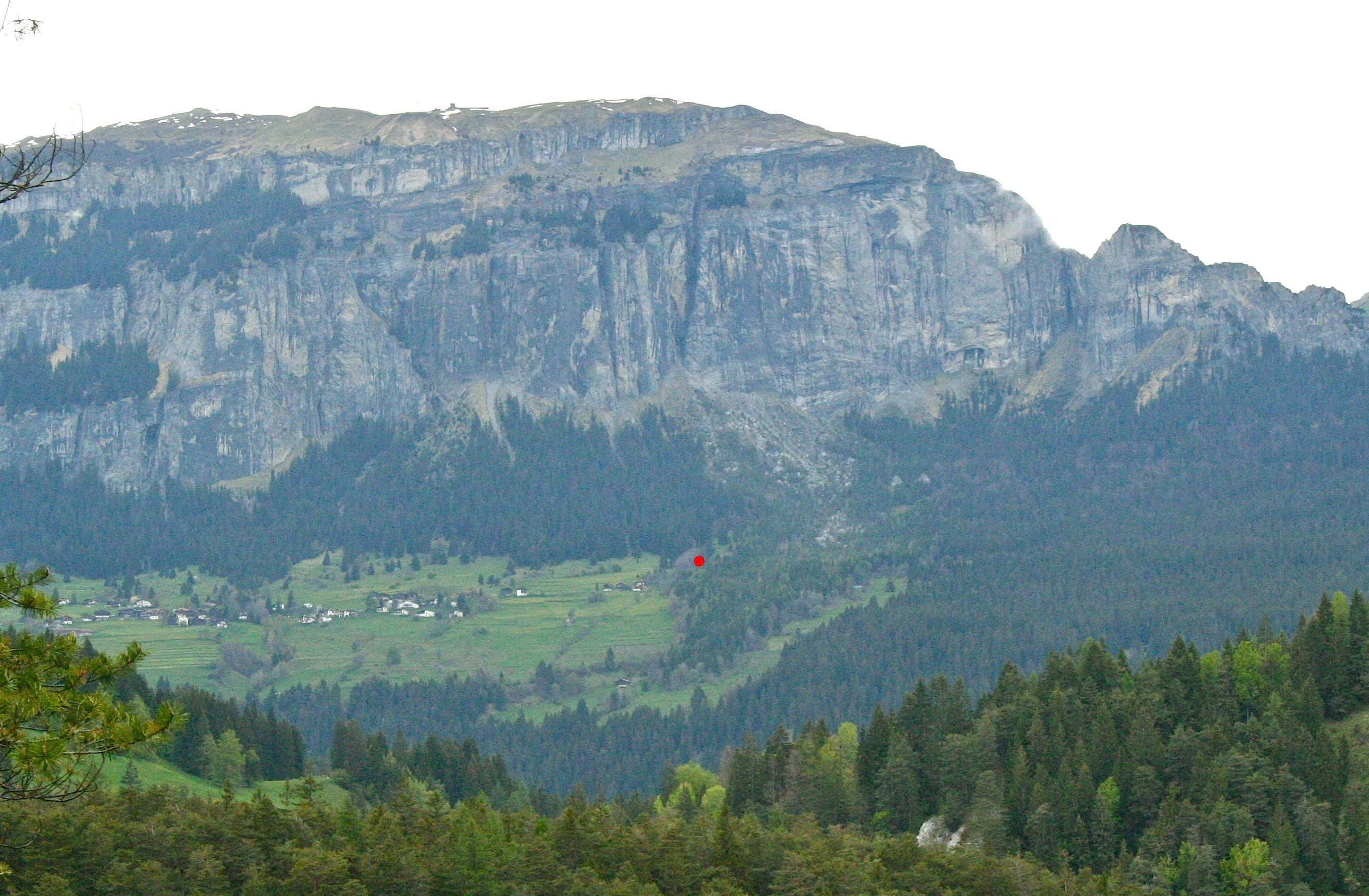 Gedenkstelle Fidazer Bergsturz